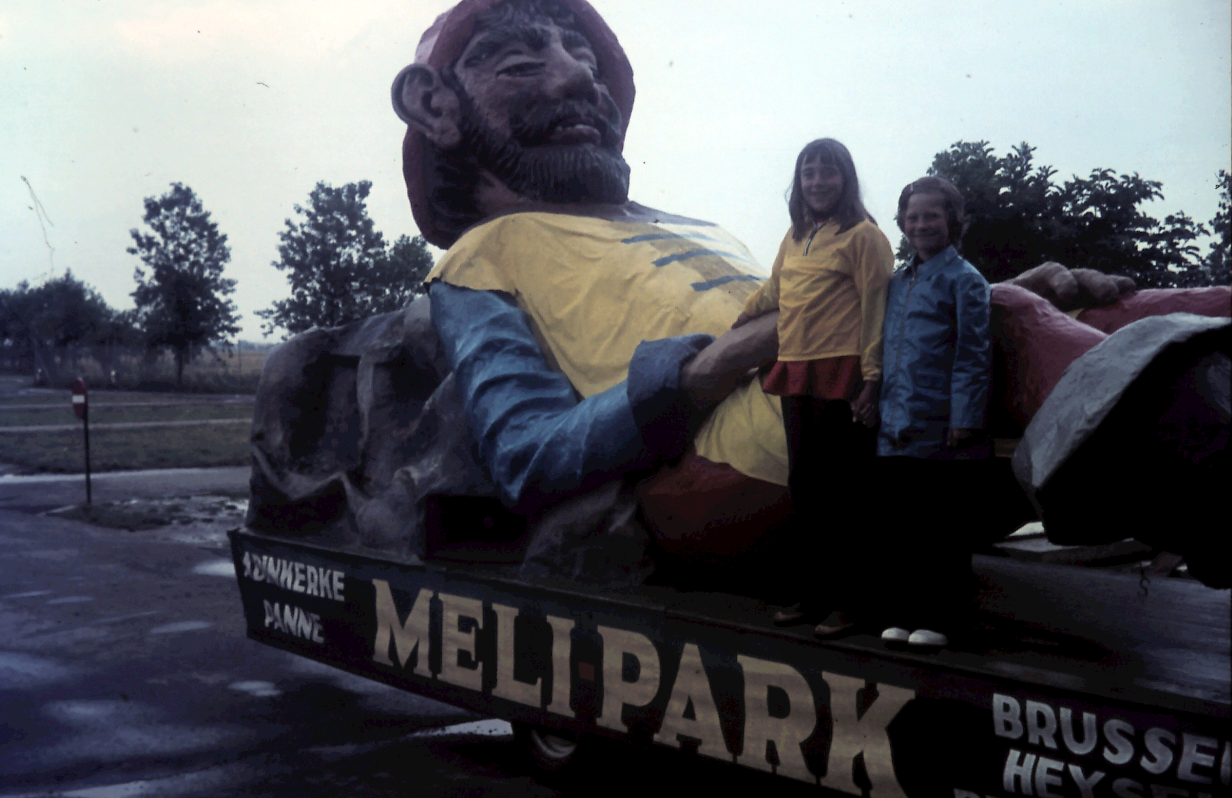 Reclamewagen voor MELI-PARK